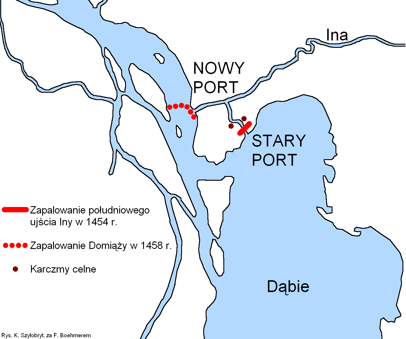 Mapa Inoujście w XV wieku